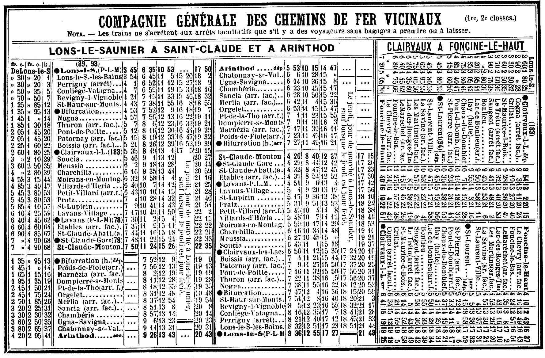 Horaires des Chemins de fer vicinaux du Jura